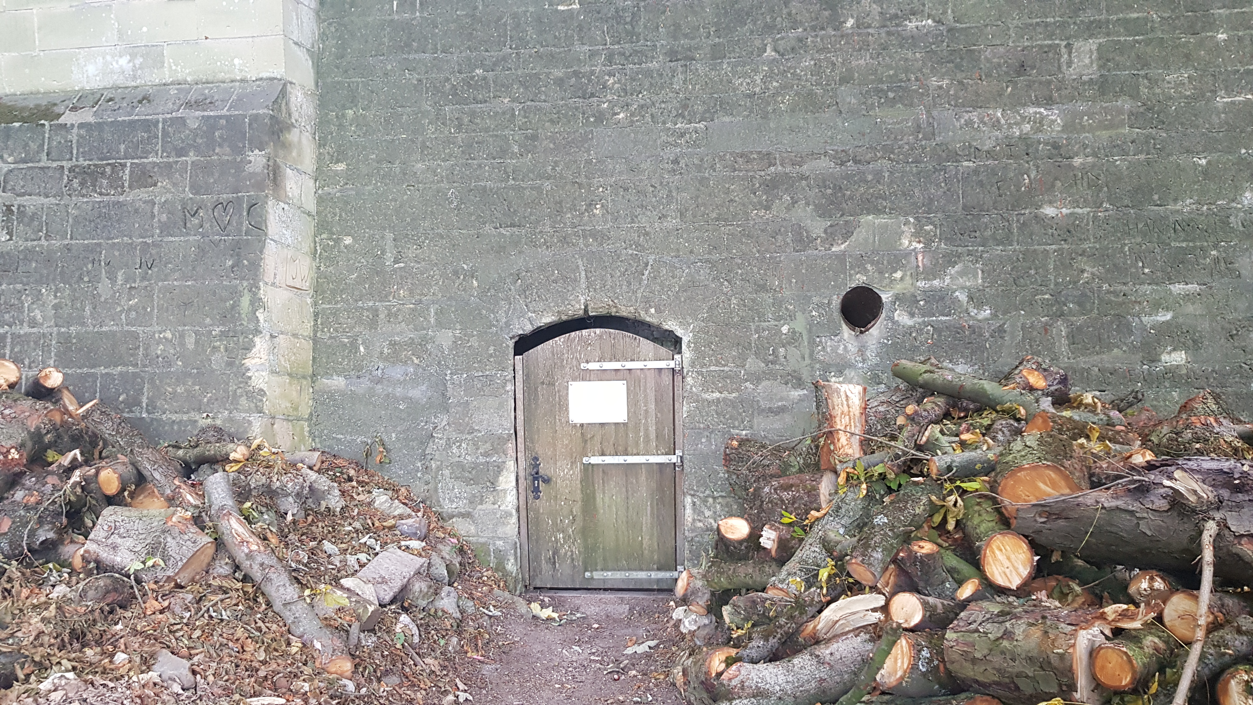 Keldertjes Slavante, Maastricht, Nederland